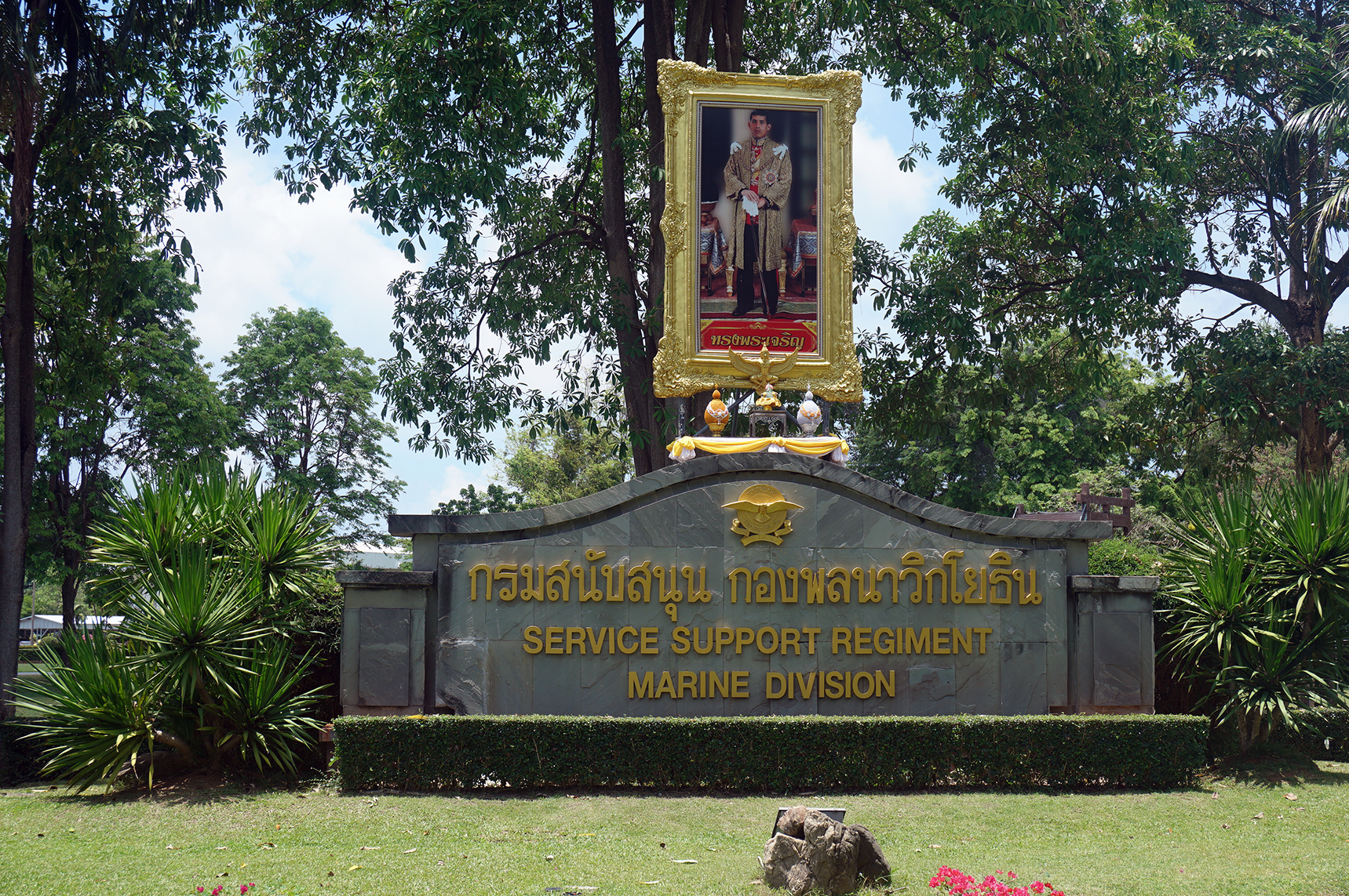 กรมสนับสนุน กองพลนาวิกโยธิน